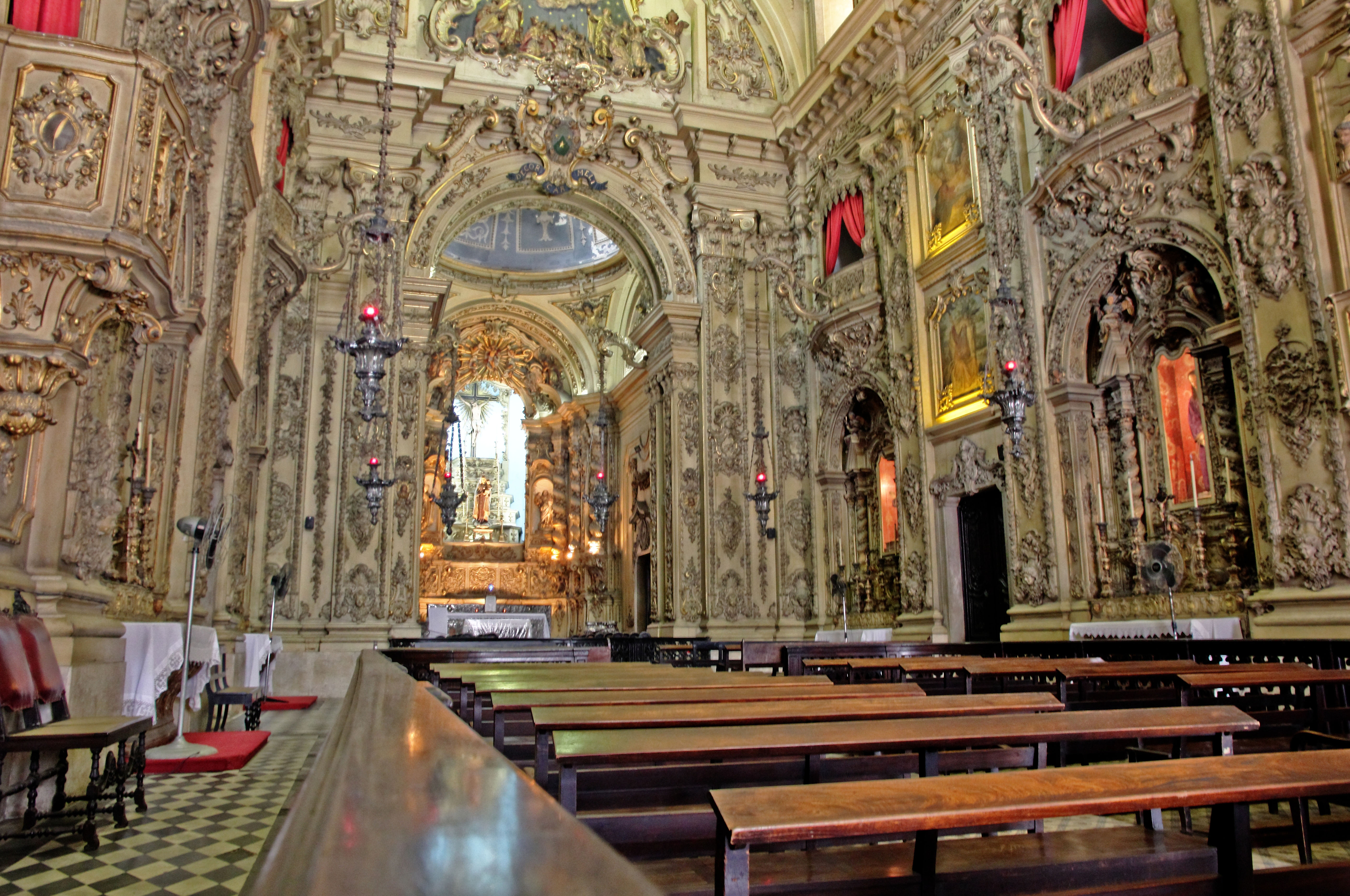 Igreja da Ordem Terceira de Nossa Senhora do Monte do Carmo